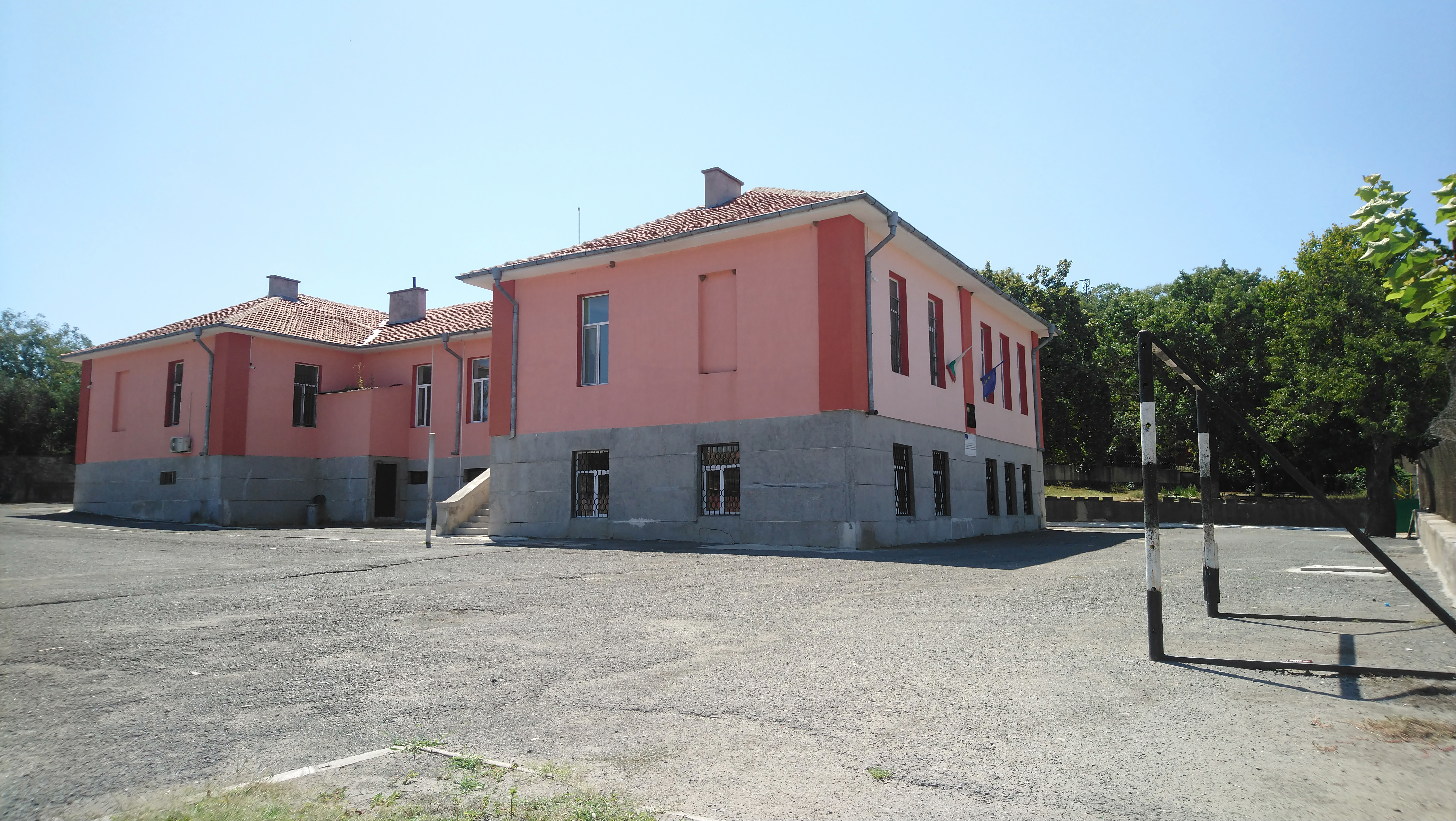 Вресово - ОУ Д-р Петър Берон